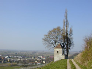 Markgräflerland Blick von den Reben bei Müllheim auf die Rheinebene (Original text: Markgräflerland Blick von den Reben bei Müllheim auf die Rheinebene) Kamera: Nikon Coolpix 950 Software: GIMP Andere Versionen